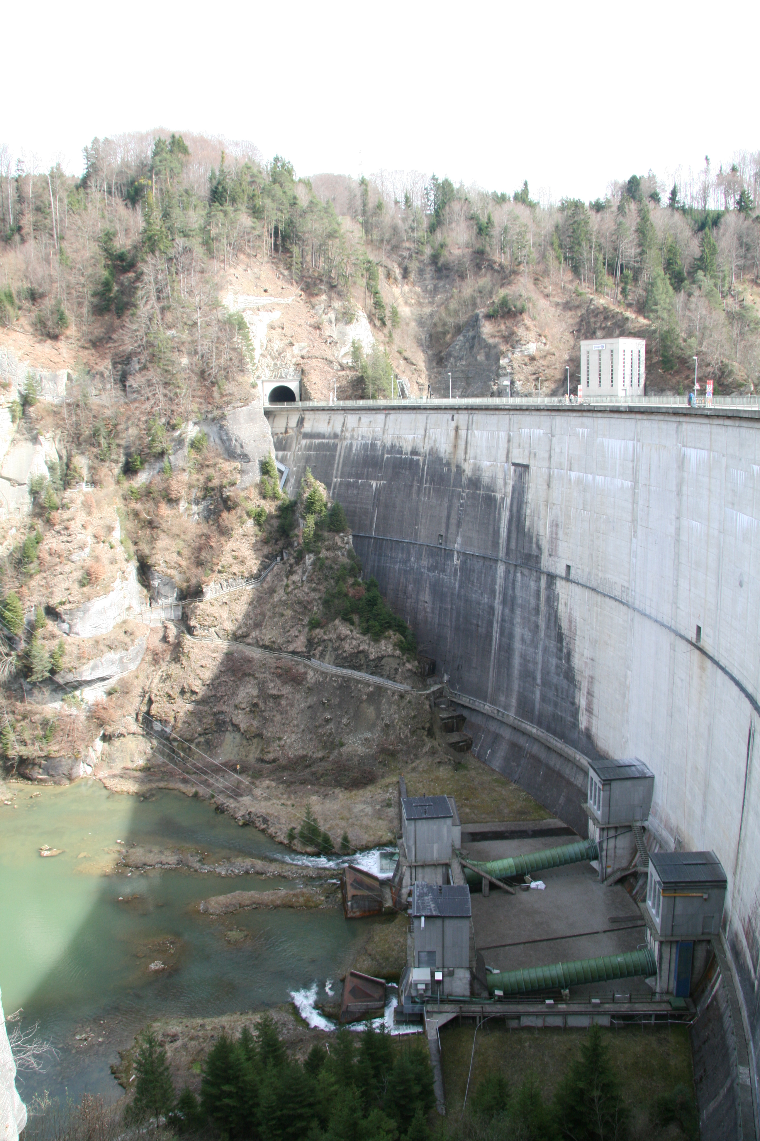 Die Staumauer des Lac de la Gruyere bei Rossens